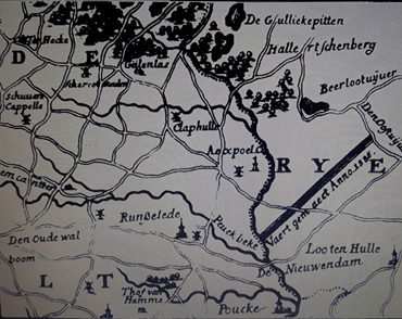 Plattegrond waterwegen 'Slag' van de Witte kaproenen